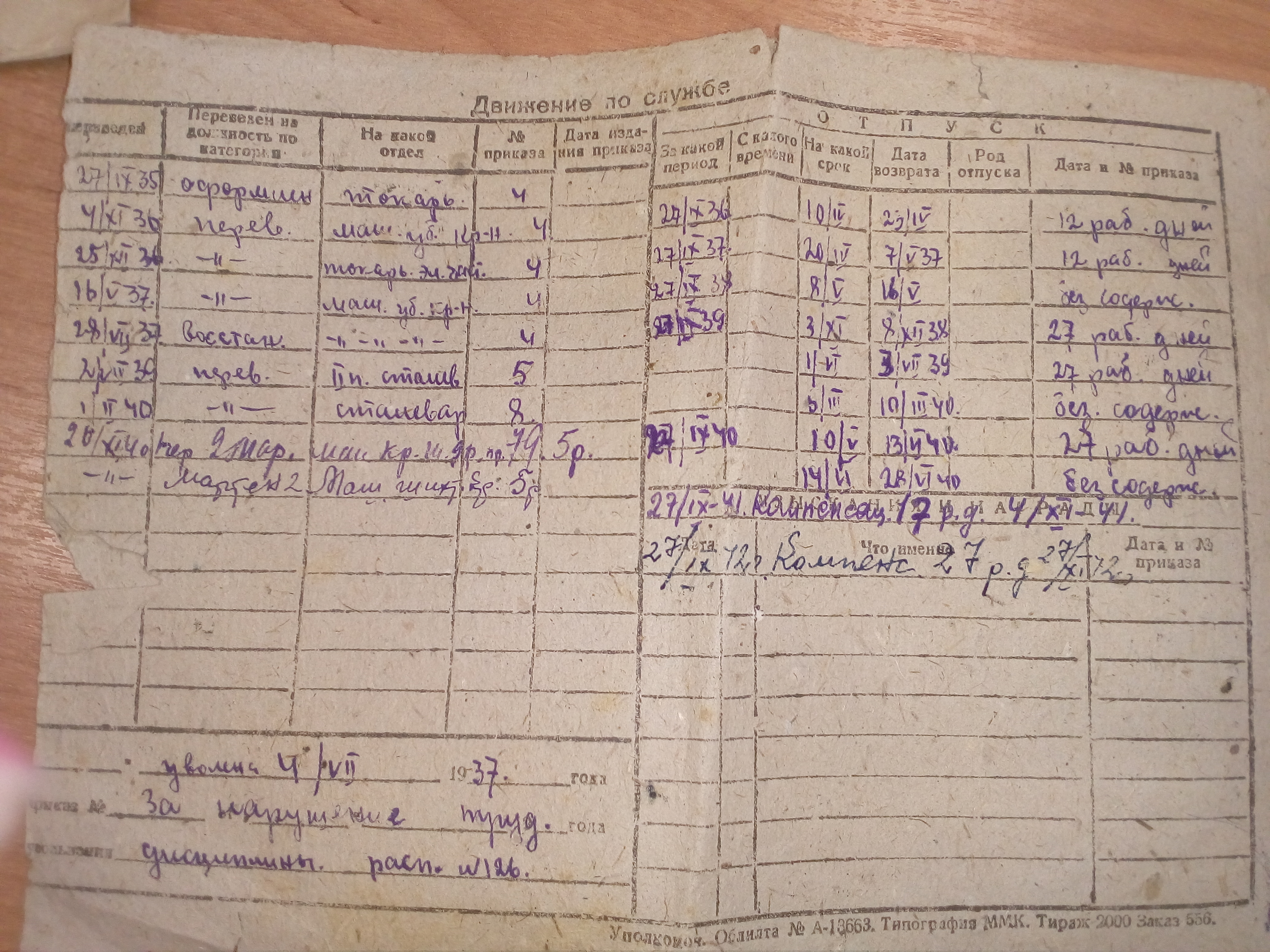 Трудовой листок Т.М. Ипполитовой